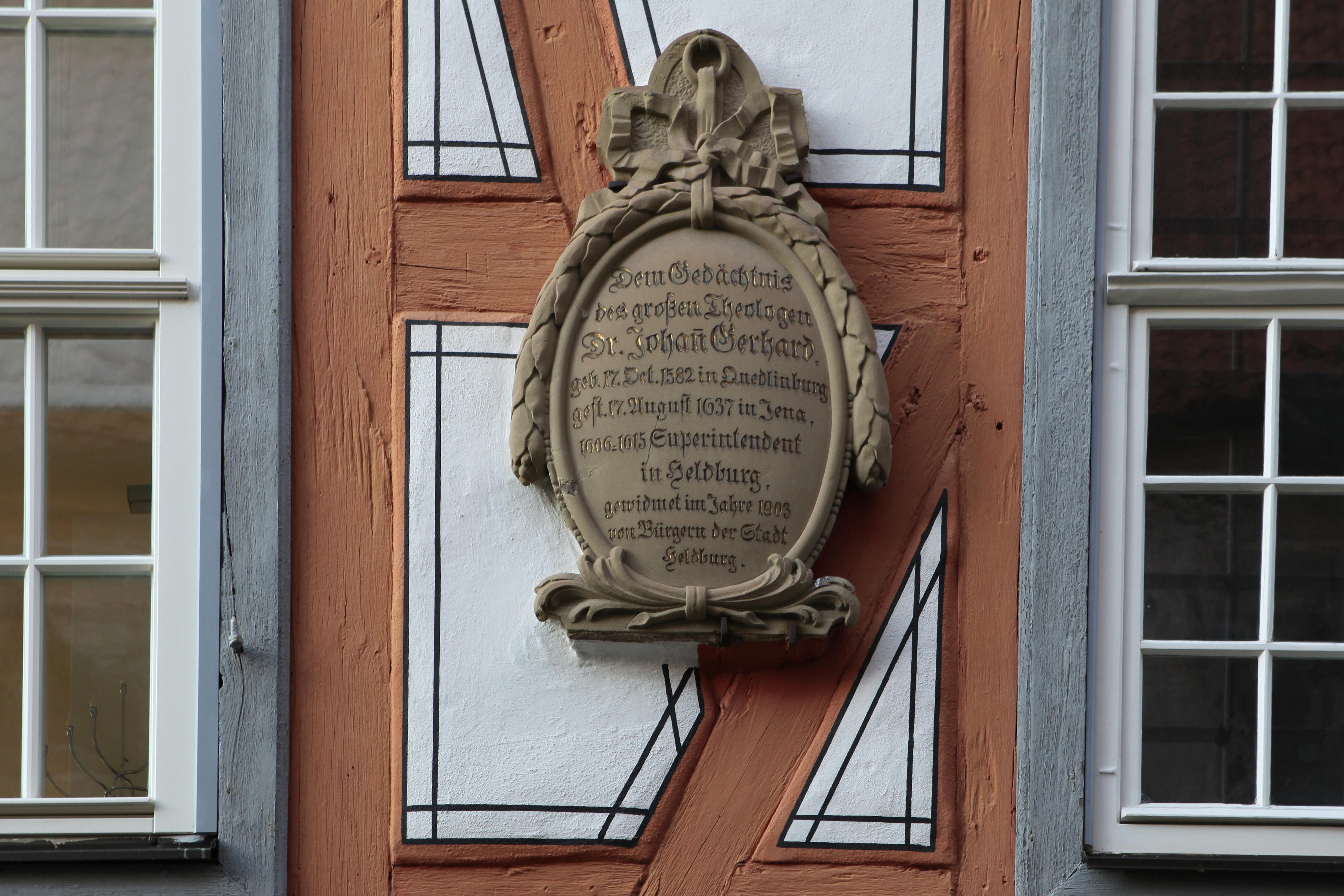 Gedenktafel Johann Gerhard am Heldburger Pfarrhaus